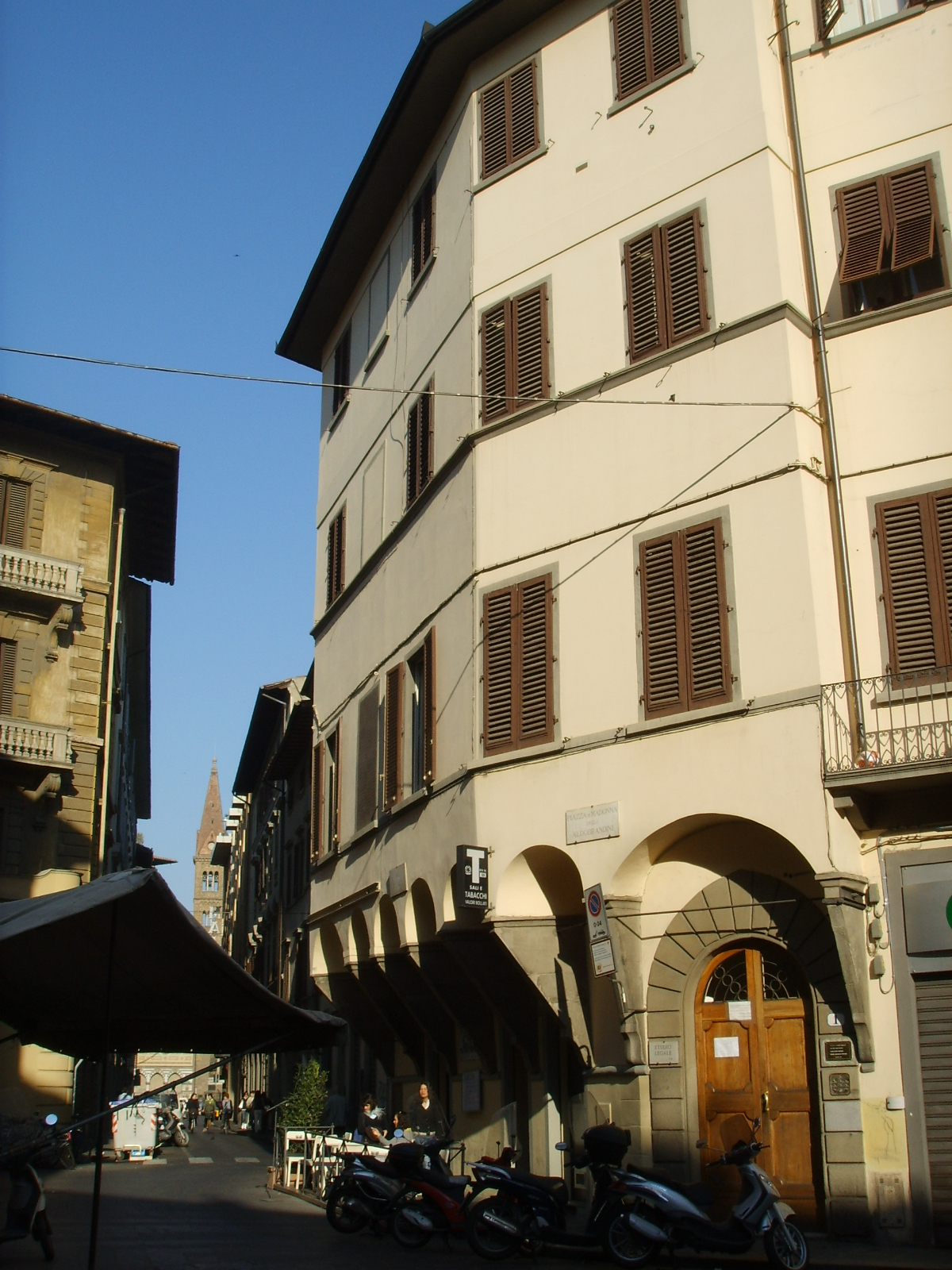 Palazzo gaddi 02